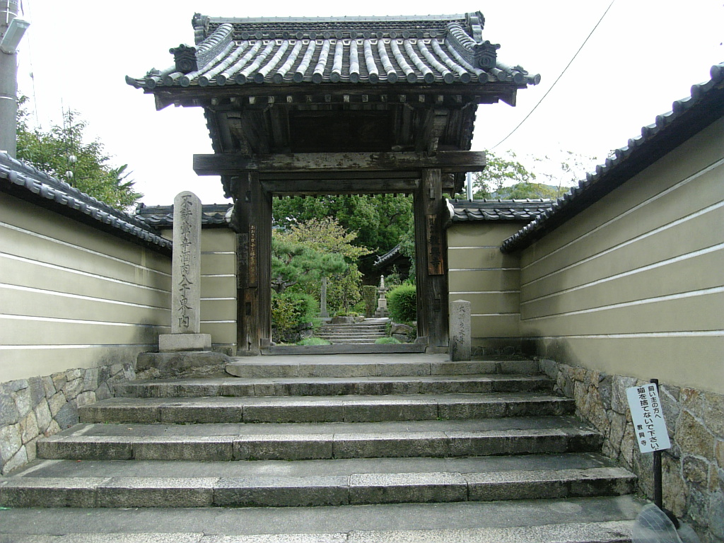 教興寺（大阪府八尾市）山門